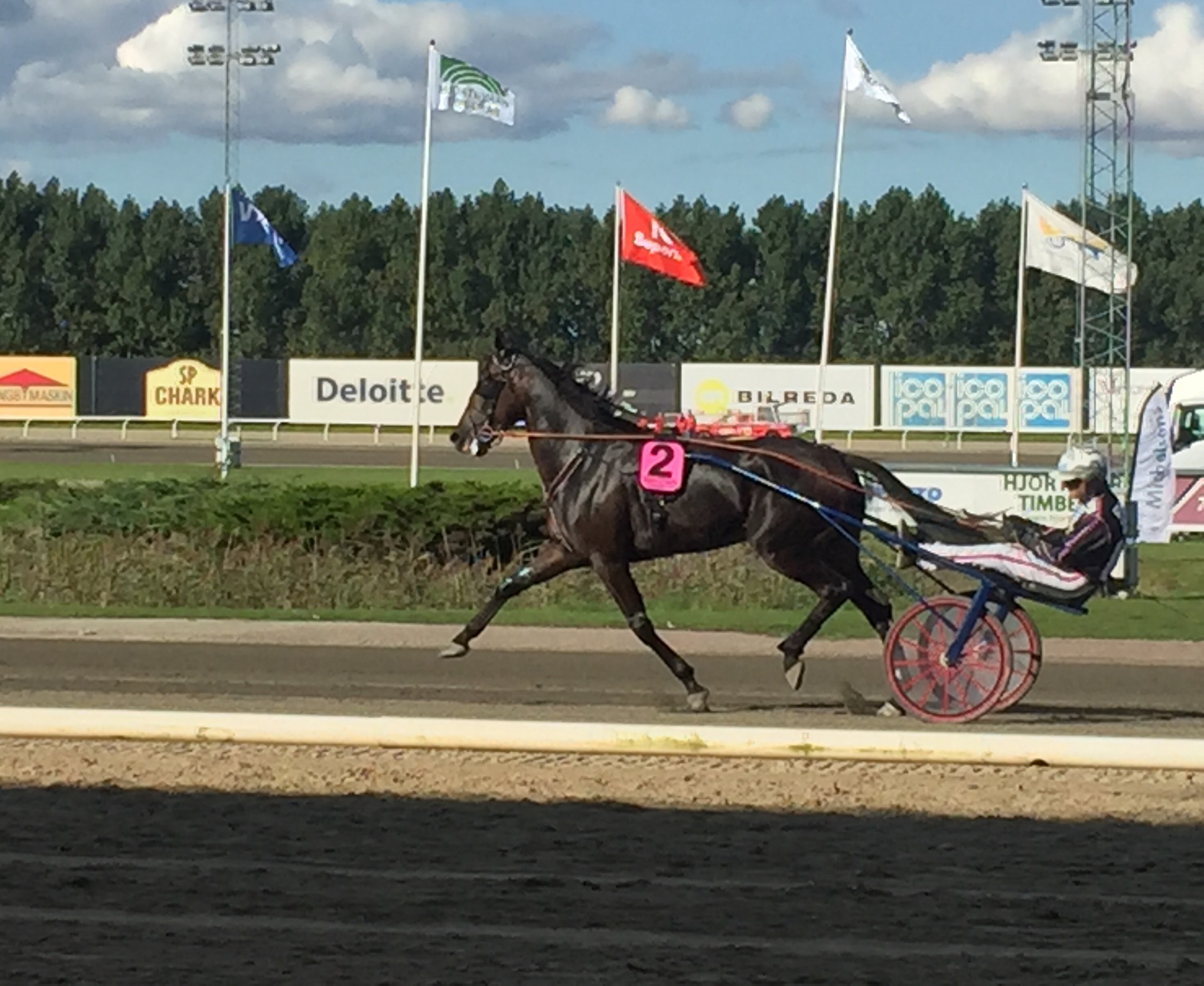 Ulf Ohlsson och hästen Policy of Truth inför finalen av Svenskt Travderby 2017.